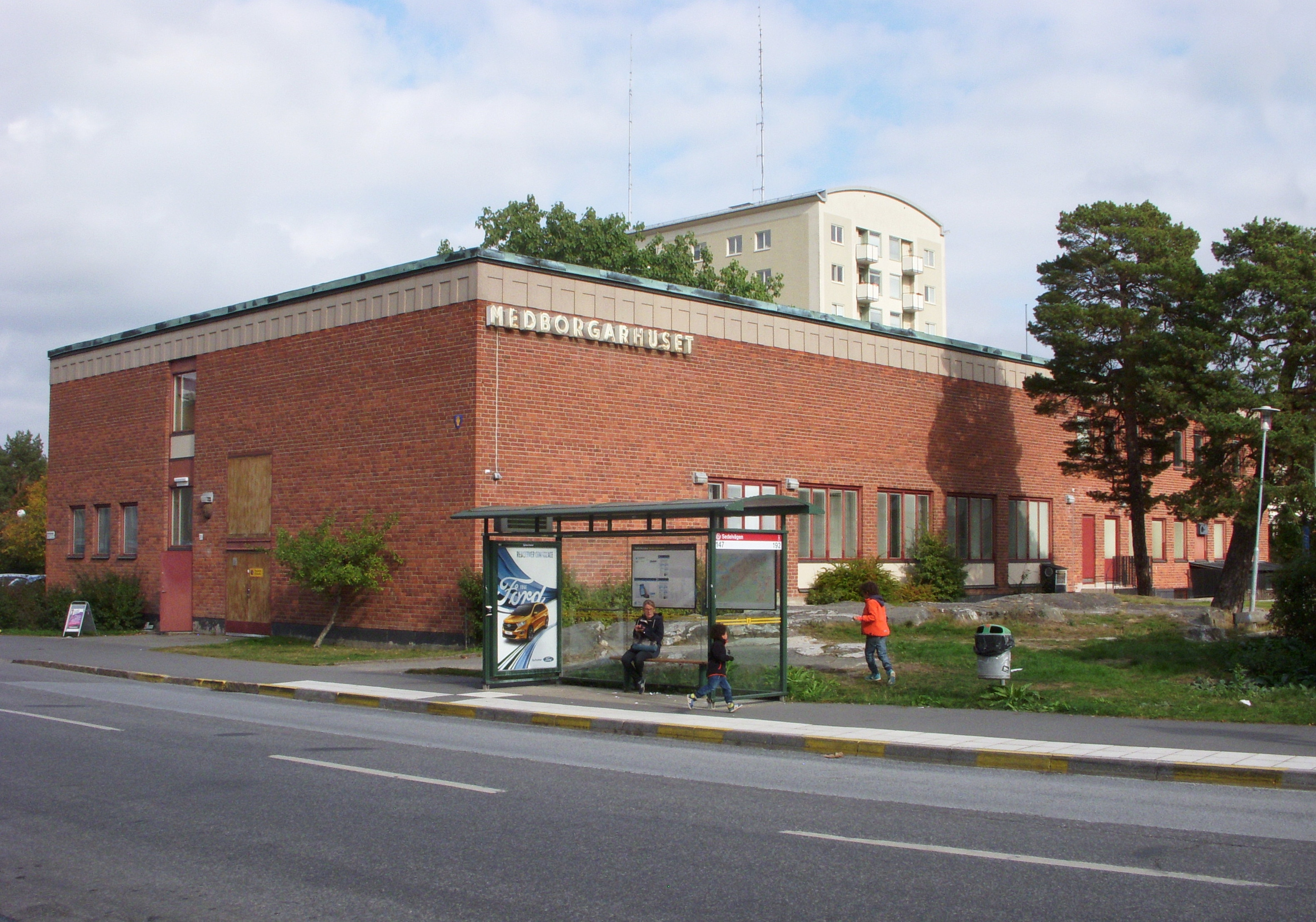 Medborgarhuset, Hägerstensåsen, arkitekt Ancker Gate Lindegren